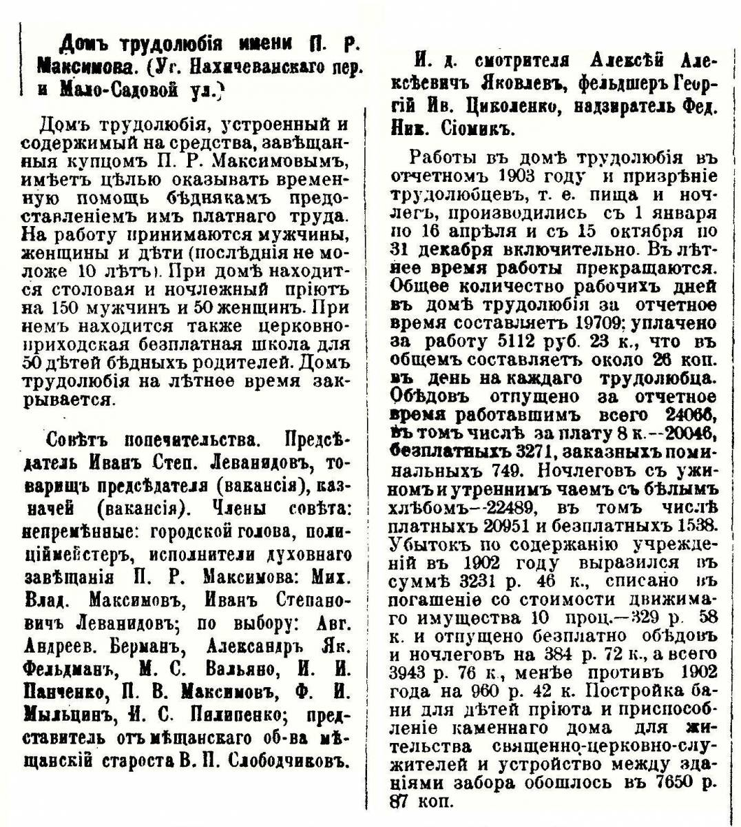 Дом трудолюбия в Ростове-на-Дону, статья в справочнике 1905 года «Донская область и Северный Кавказ».